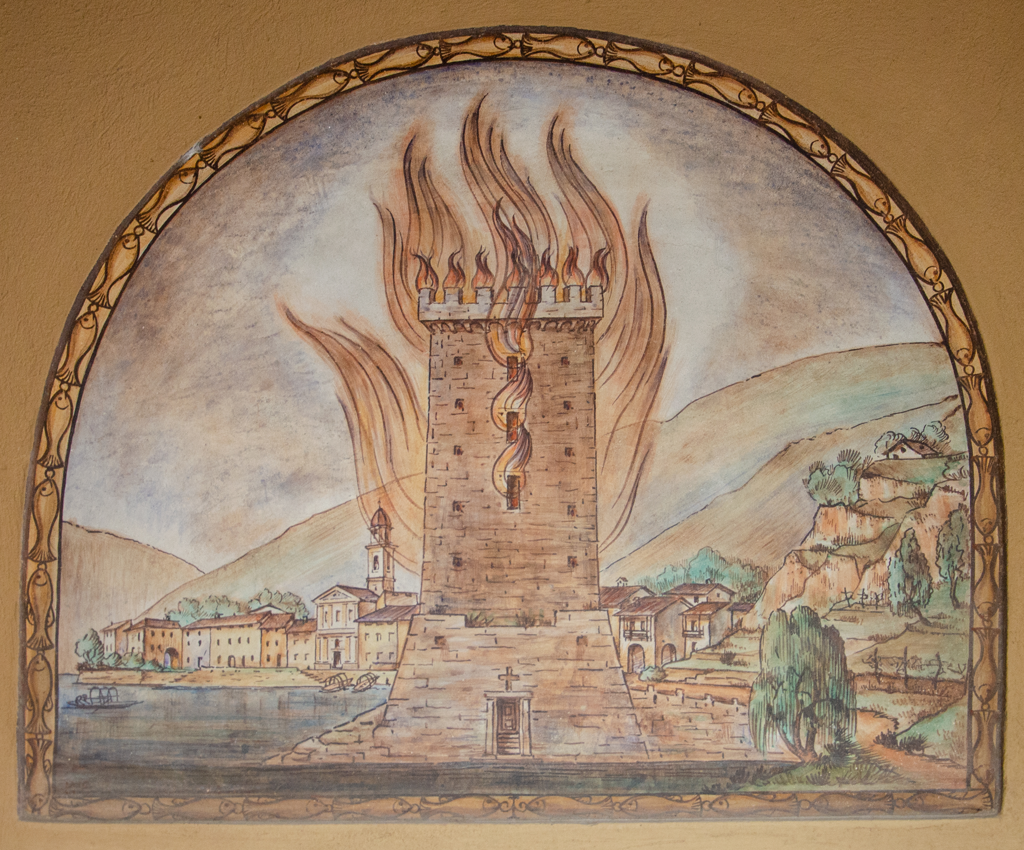 Stemma di Brusino Arsizio con in fondo paesaggio della città - Dipinto posto su una porta della chiesa parrocchiale di Brusino Arsizio